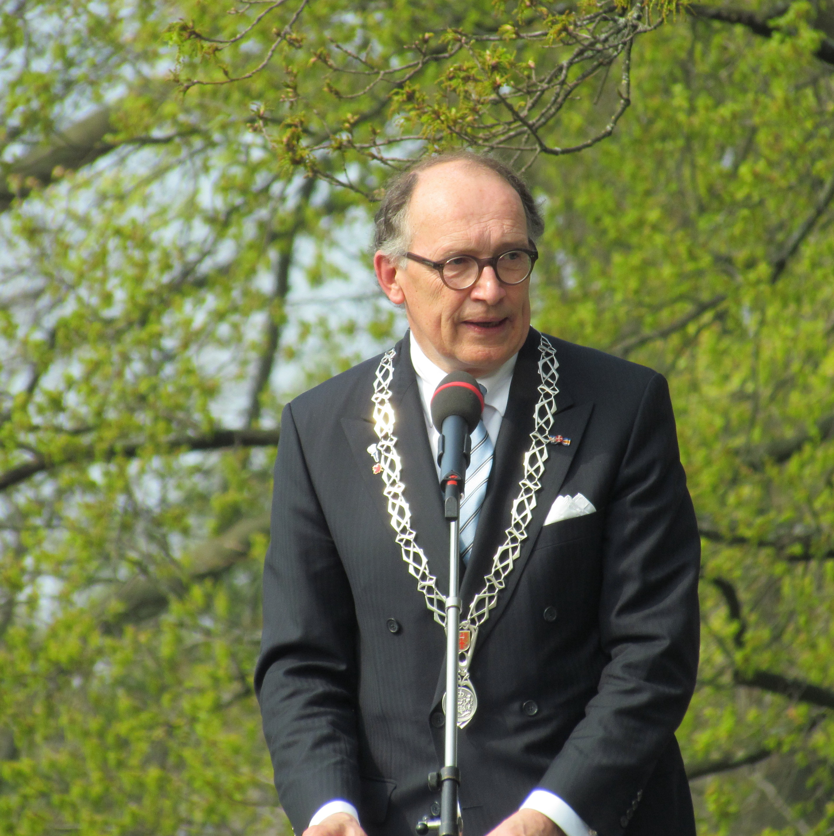 Burgemeester Fred de Graaf houdt een toespraak bij de 66e verjaardag van de bevrijding van Apeldoorn